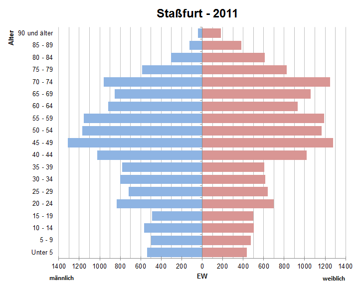 Bevölkerungspyramide der Stadt Stassfurt nach Zensus 2011.